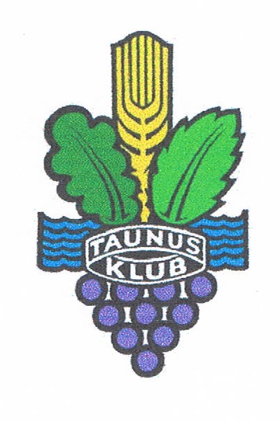 Farbiges Logo des Taunusklubs (hier von MV Lorsbach).